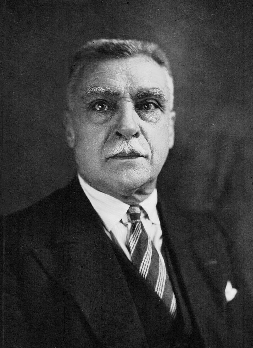 Charles Berthezenne, député de la Nièvre (??)